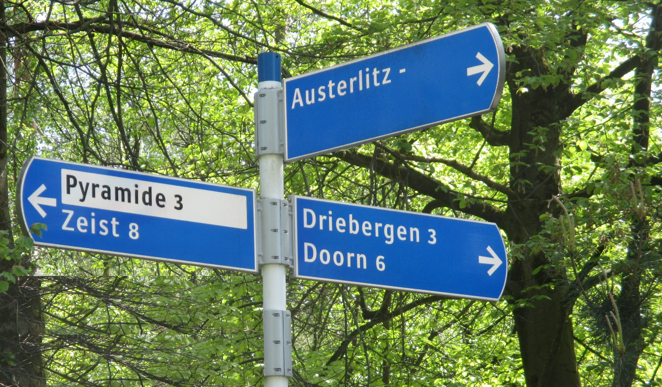 Borden richting Austerlitz dorp (via Oude Postweg) en Pyramide (van Austerlitz)